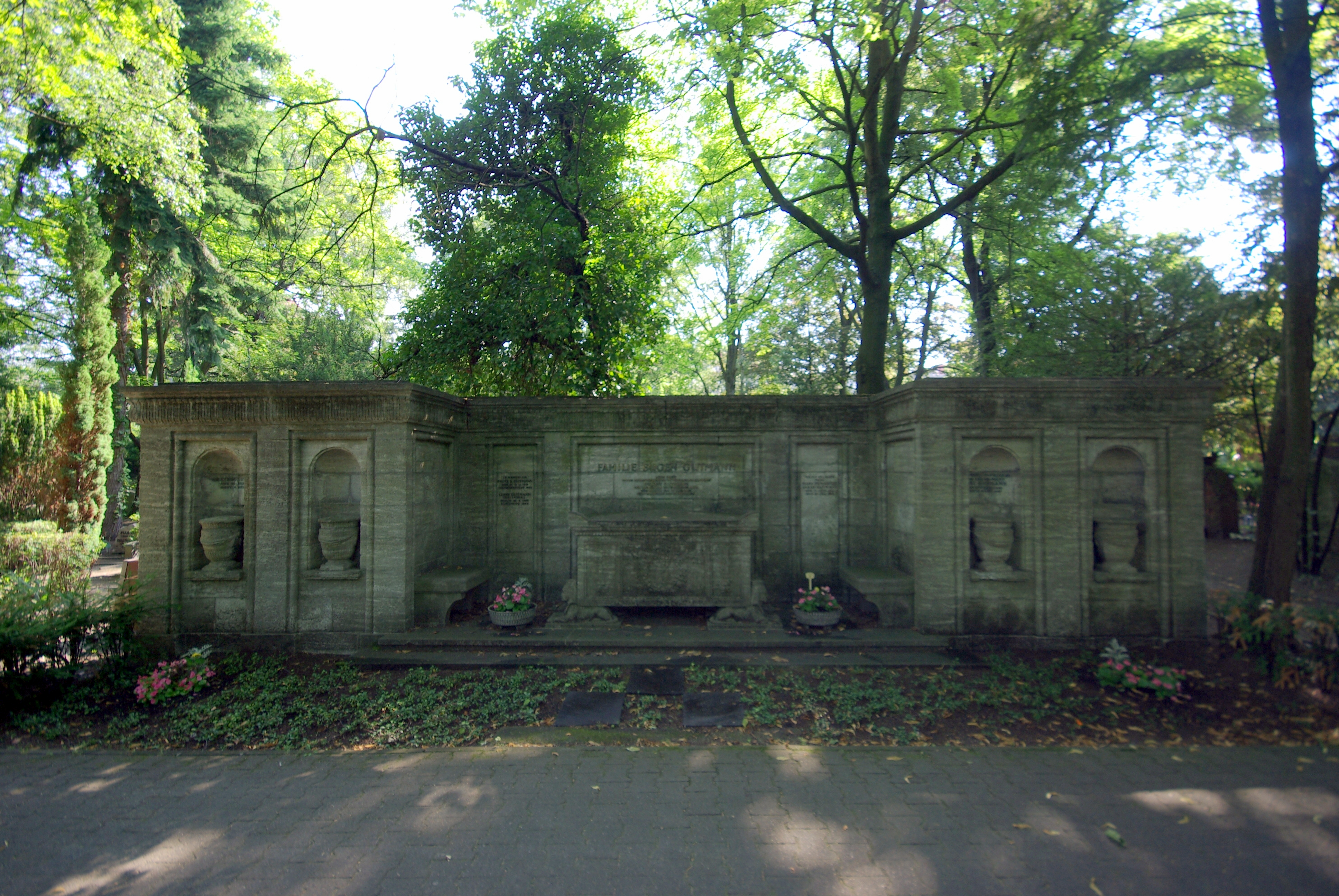 Grabmal auf dem Erbbegräbnis der Familie Gutmann, entstanden 1916 nach Entwurf des Architekten Franz Seeck, auf dem Urnenfriedhof Gerichtstraße in Berlin-Wedding, unter Denkmalschutz